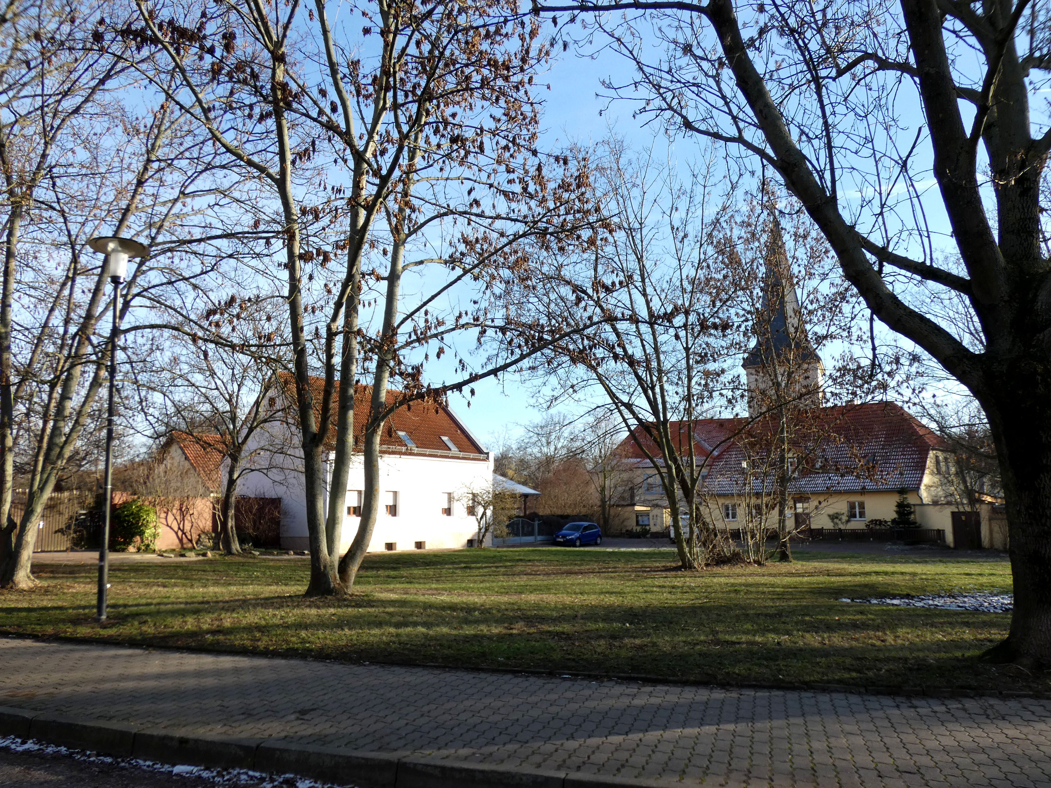 Südliche Neustadt, Passendorf, Schulplatz, Halle (Saale)